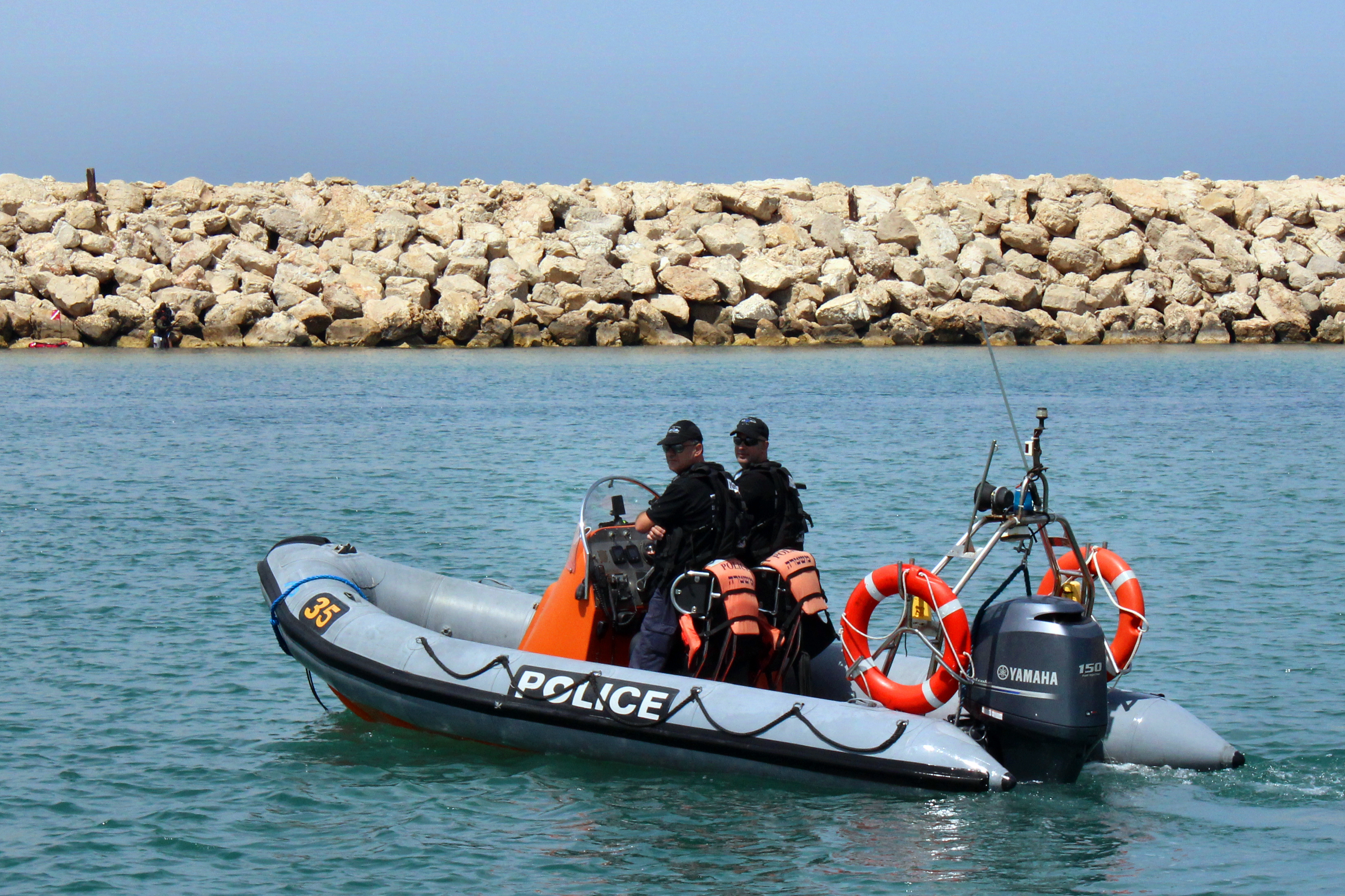 סירה של יחידת השיטור הימי מפטרלת בחוף תל-אביב ליד תחנת הכוח רדינג, מאי 2014.